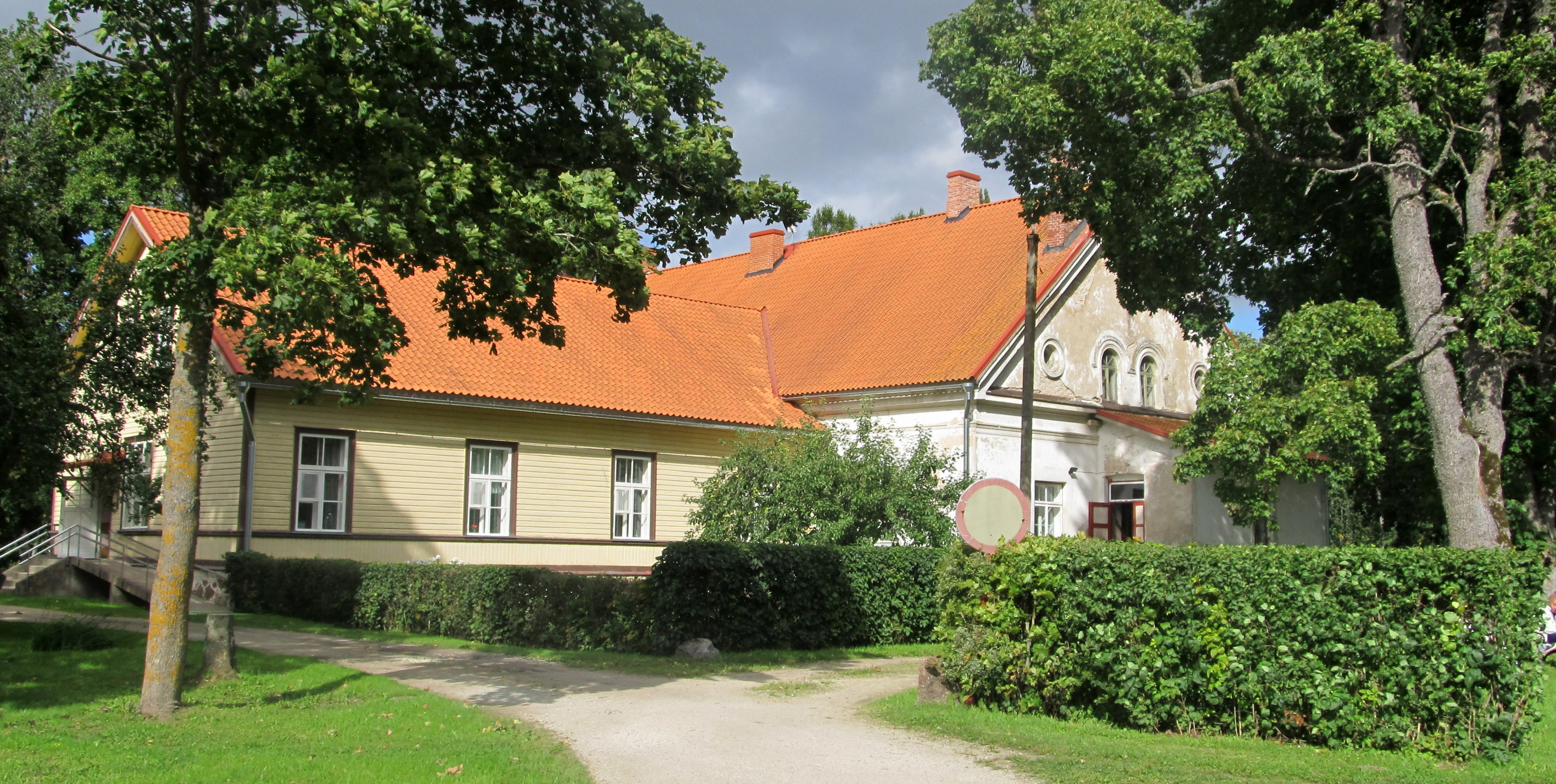 Undla mõisa peahoone